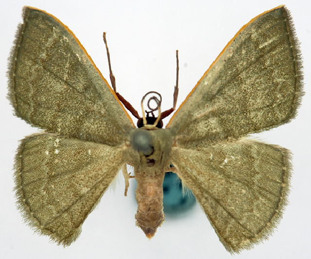 Symmacra ochrea